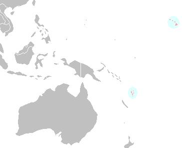 Description=Areale di distribuzione della specie